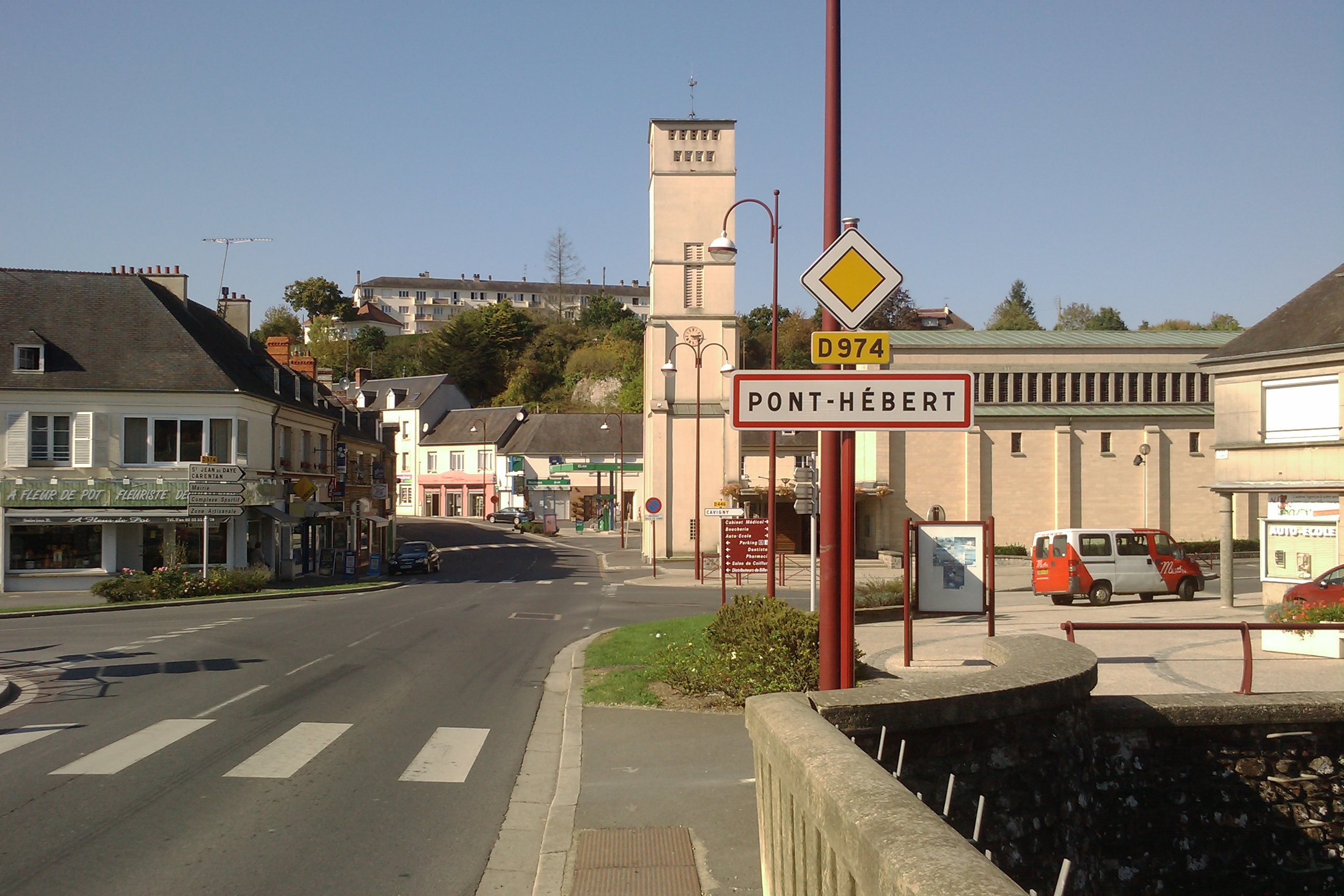 Pont-Hébert, pris depuis le pont sur la Vire